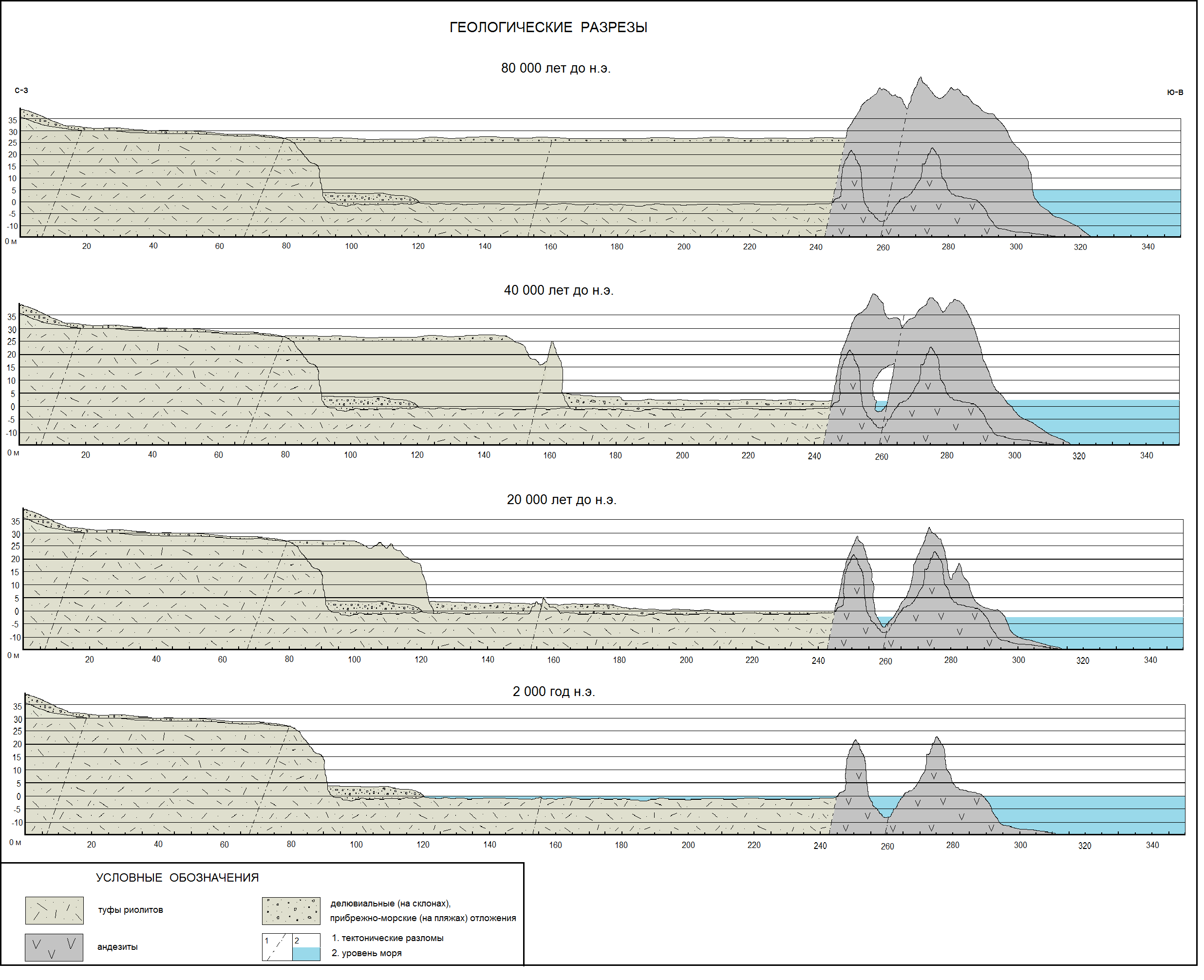 Схема, иллюстрирующая развитие береговой линии Японского моря в районе м. Бринера и кекуров Два Брата